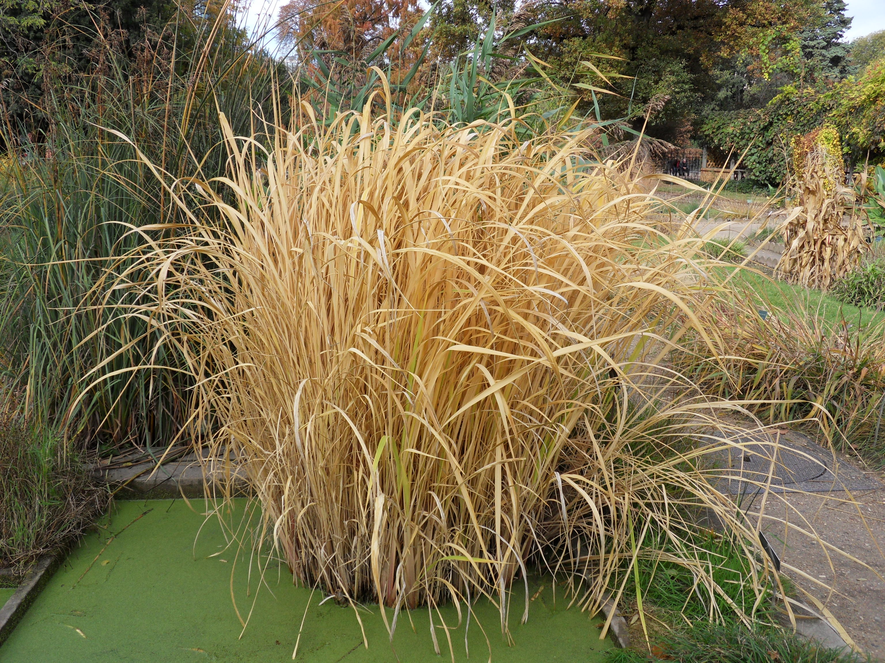 Riz sauvage de Mandchourie Zizania latifolia (Griseb.) au Jardin des Plantes de Paris, feuillage d'automne syn. Hydropyrum latifolium (Griseb.)